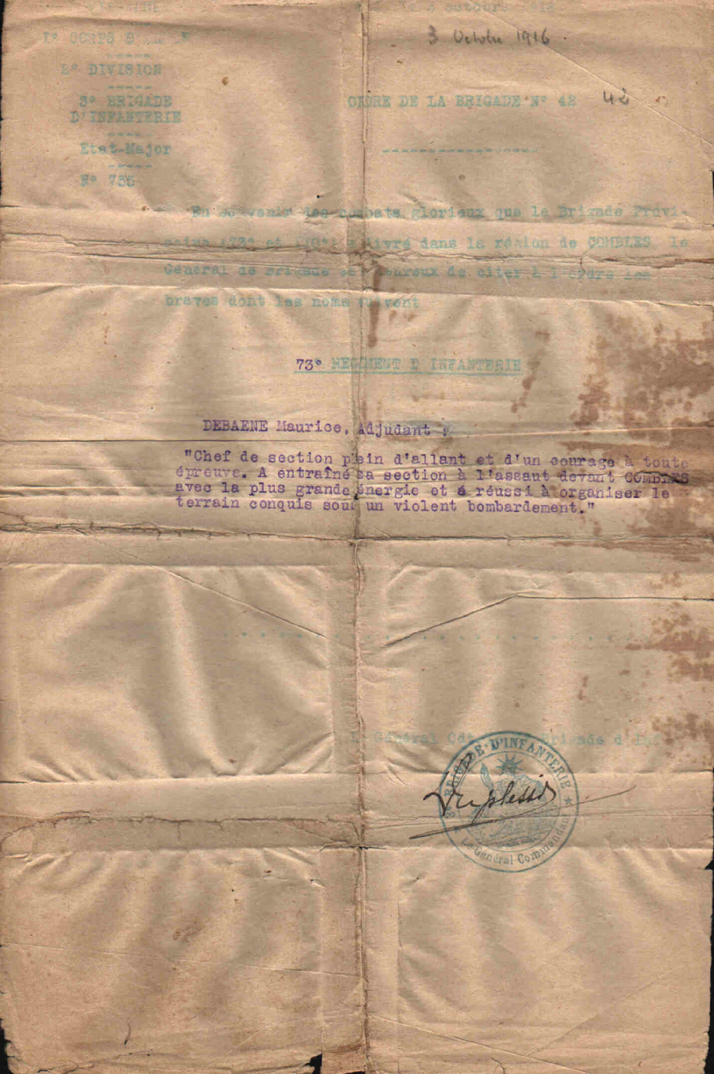 citation a l'ordre de l'armee Maurice Debaene 73 RI